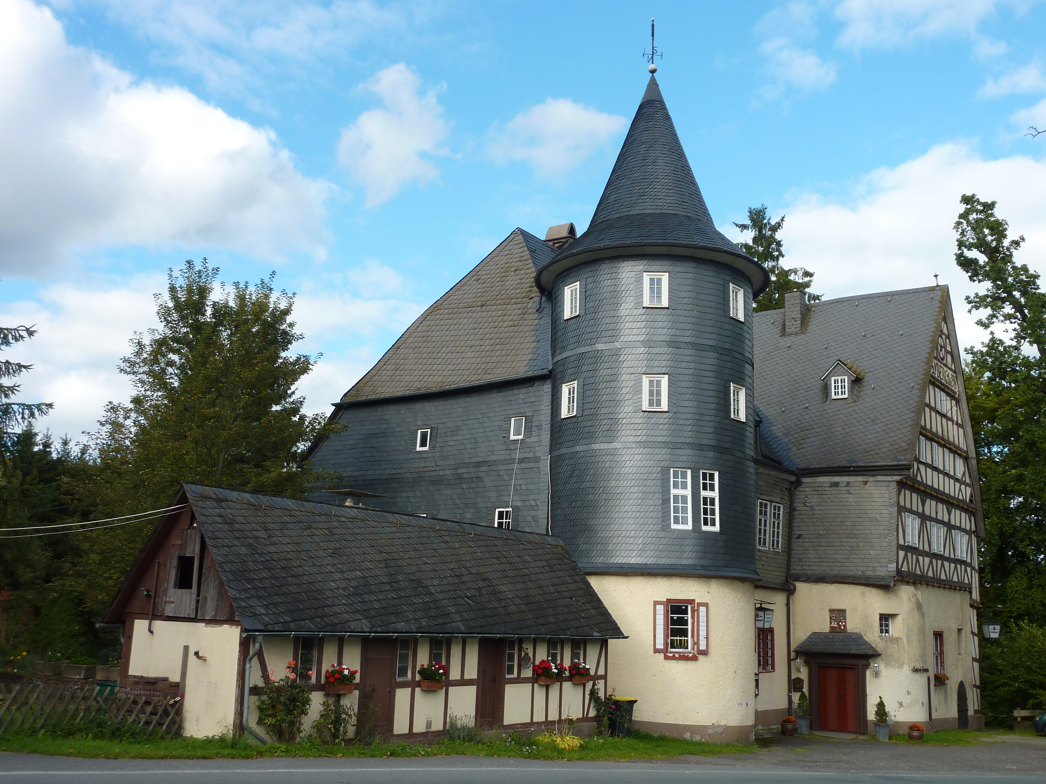 Kreuztal (Kreis Siegen-Wittgenstein/Westfalen), Ortsteil Junkernhees: Das im Jahr 1523 als Wasserschloss erbaute Schloss Junkernhees; Ansicht von Süden.